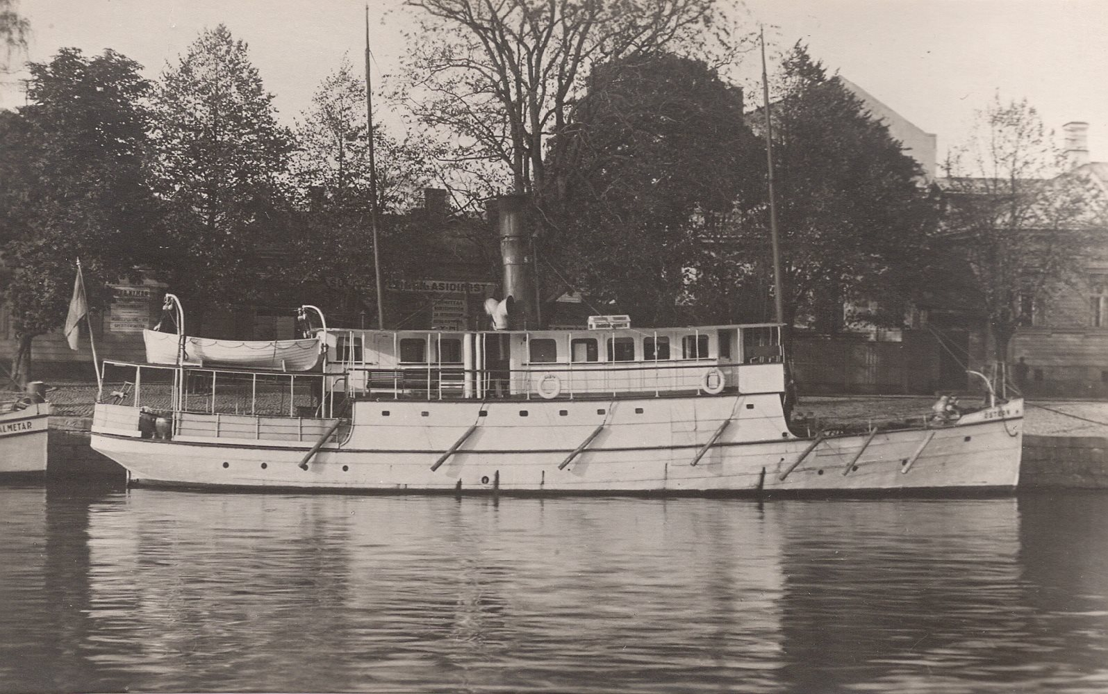 M/S östern aurajoessa